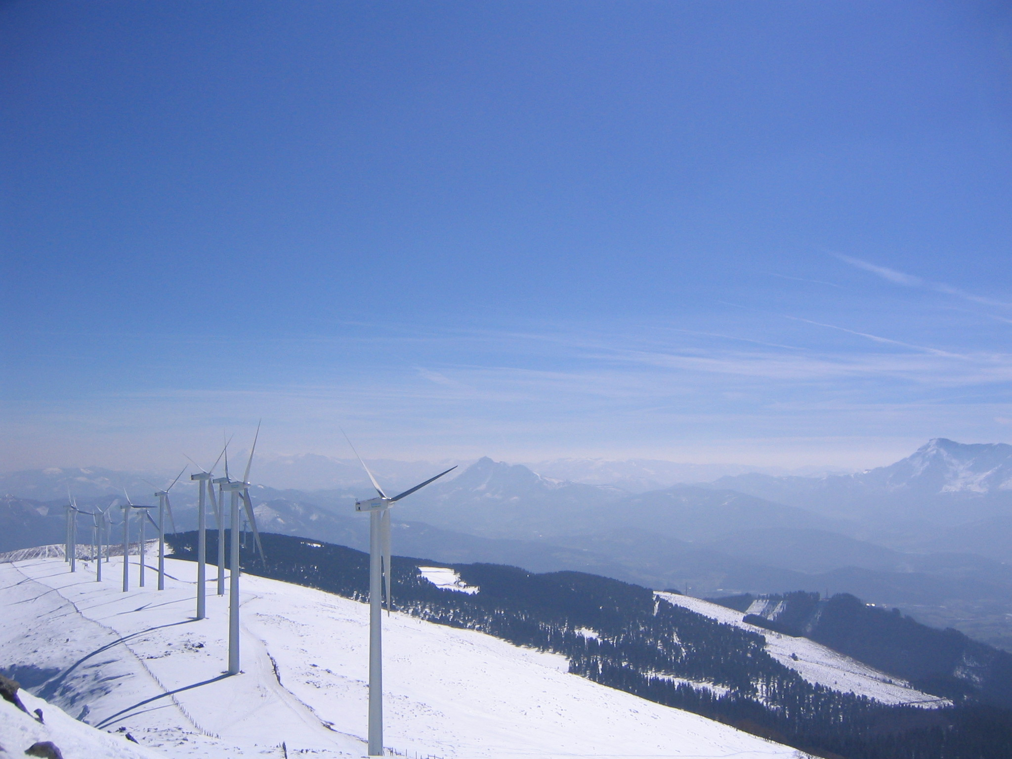 Vista parcial del parque eólico del monte Oiz en Vizcaya, País Vasco (España).